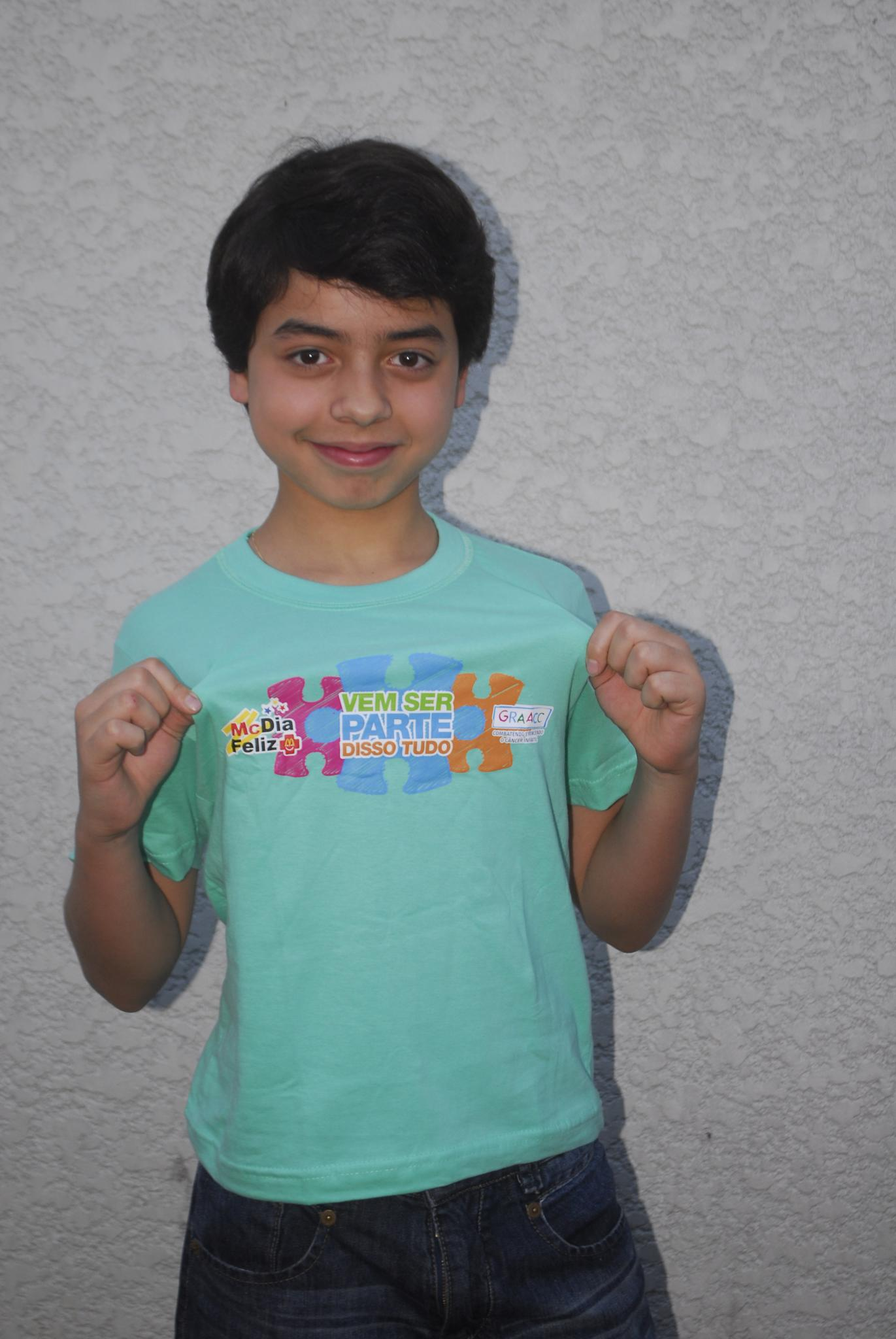 Gustavo Daneluz no McDia Feliz de 2012.